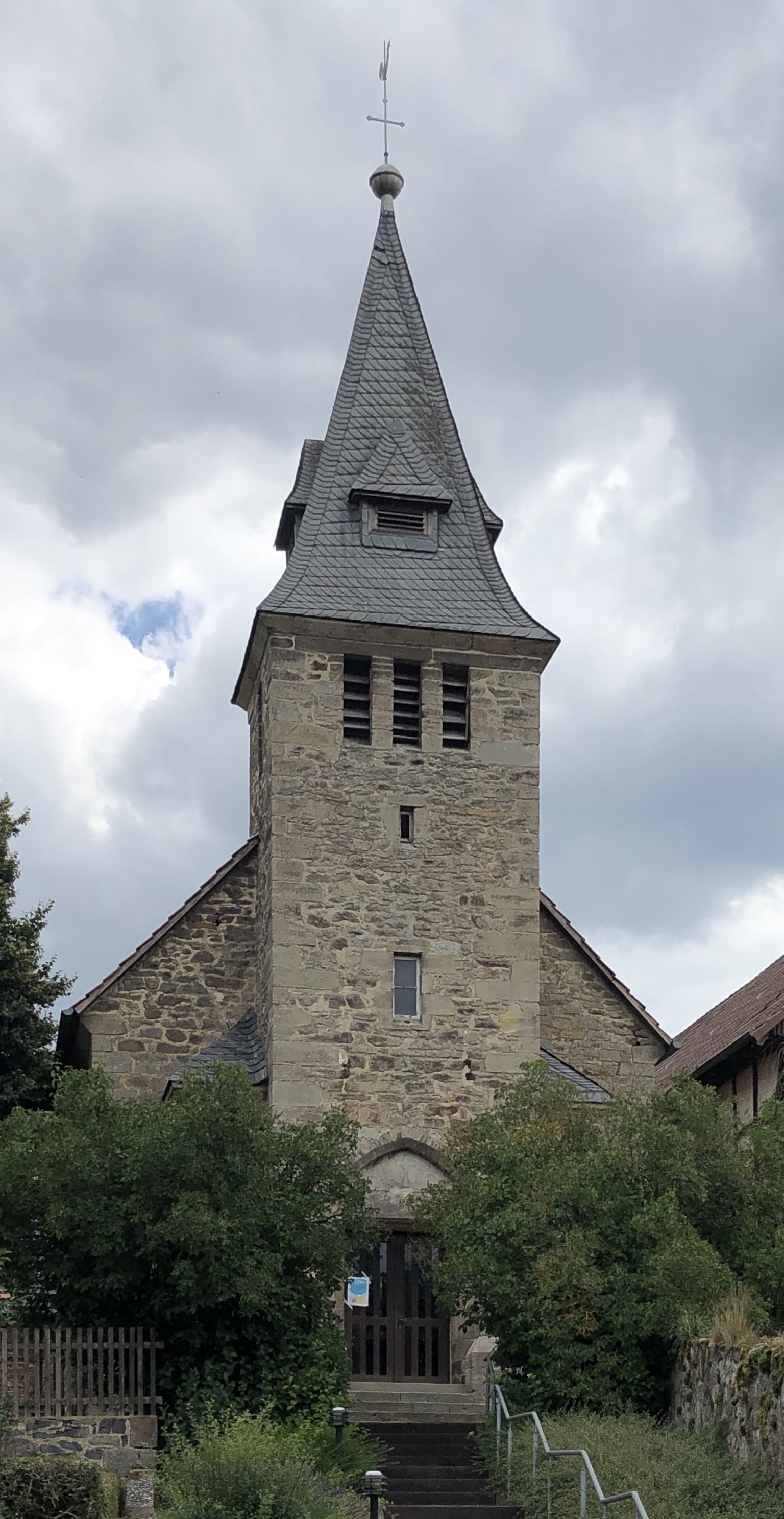 Eingangsseite